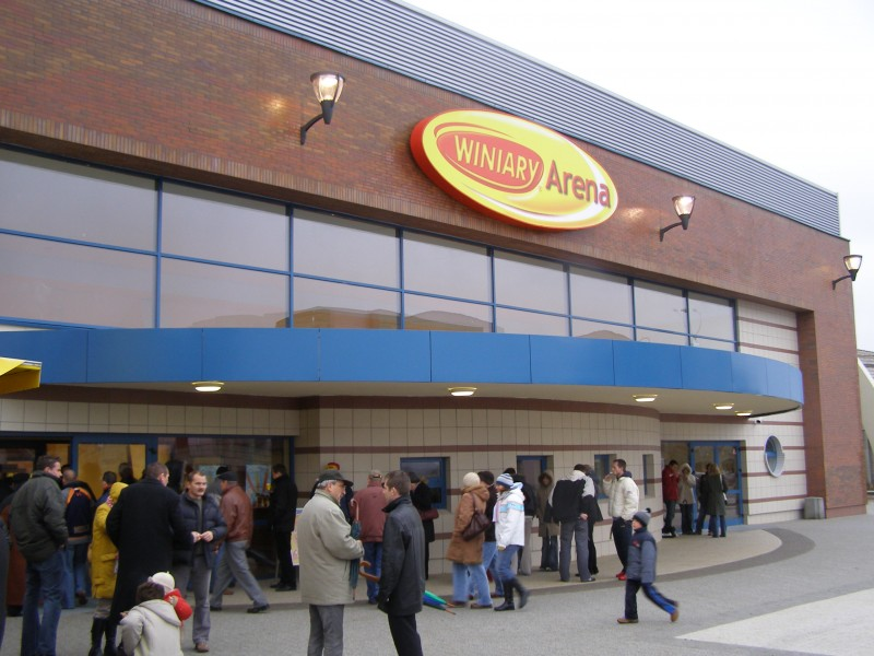 Hala Sportowo-Widowiskowa "Winiary Arena" w Kaliszu. Zdjęcie: 05/11/2006r